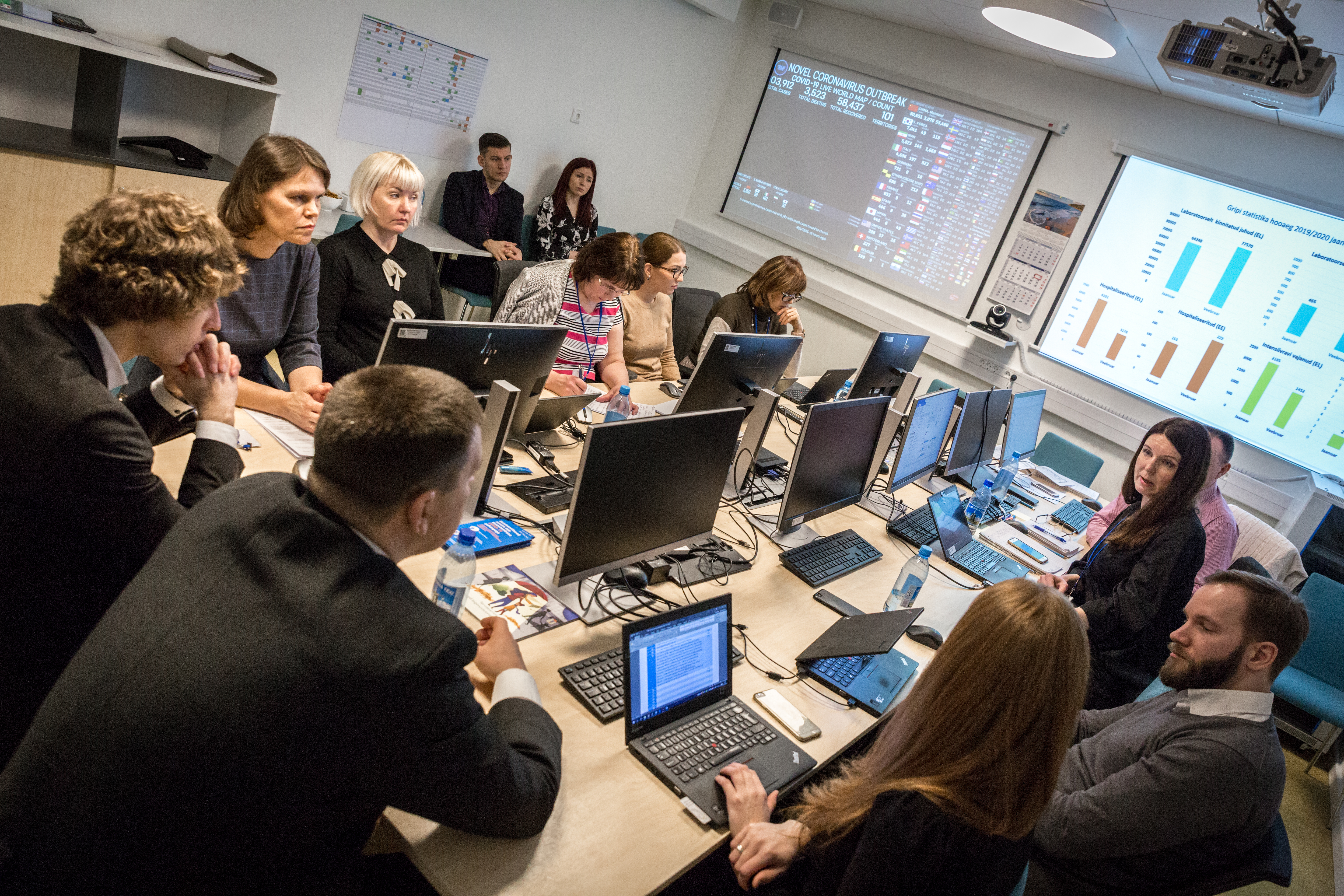 Koroonaviiruse koosolek Terviseametis 7. märtsil 2020